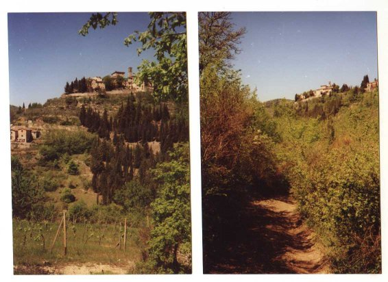 Immagine dei monti del Chianti - Montefioralle (da de.wiki) Montefioralle im Chianti-Gebiet Quelle: (selbst fotographiert) 2001 Fotografiert im Mai 2001 Fotograf oder Zeichner: Andreas Petzinna (:de:User:Pz) Copyright Status: GNU Freie Dokumentationslizenz